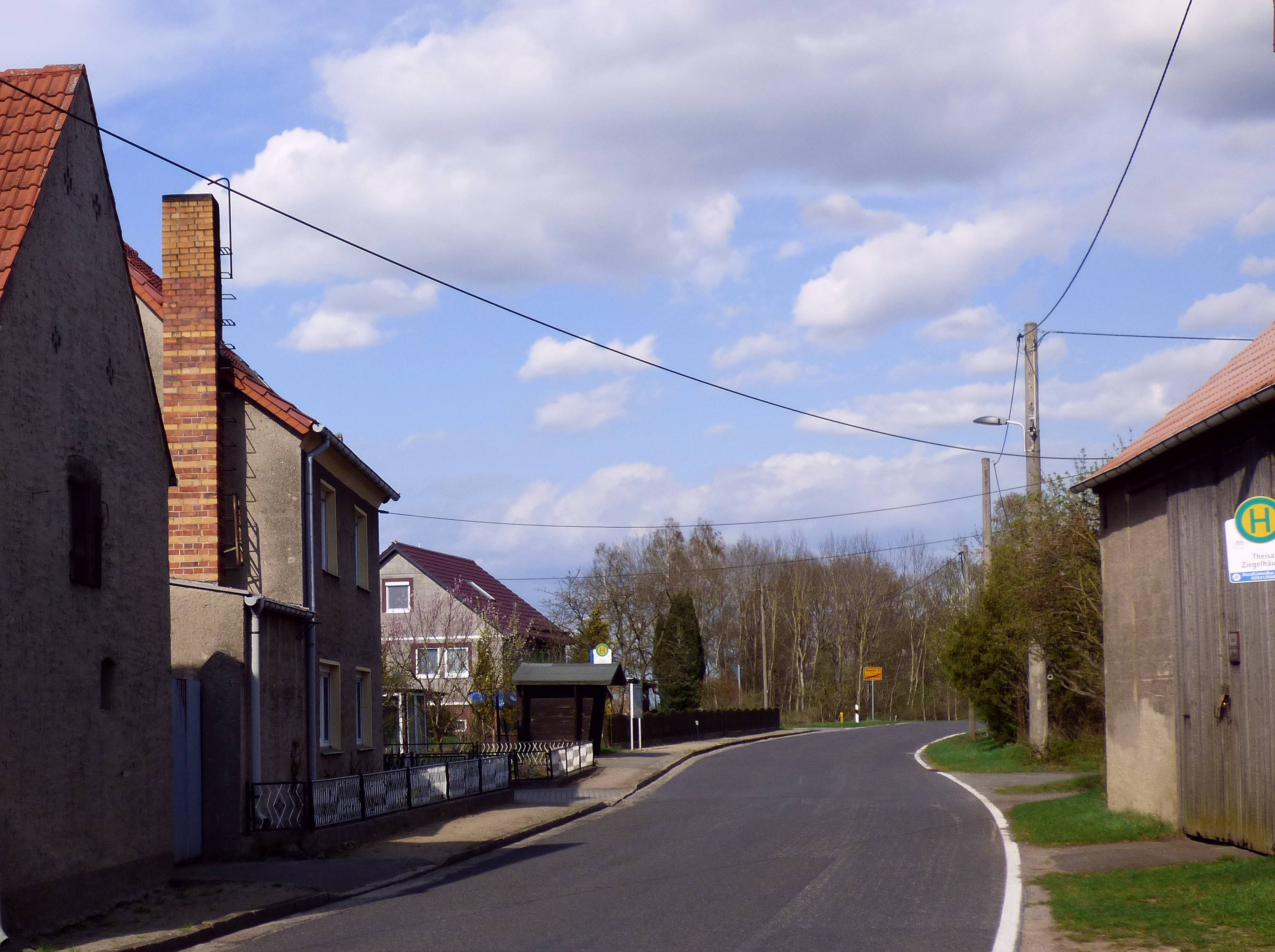 Ziegelhäuser